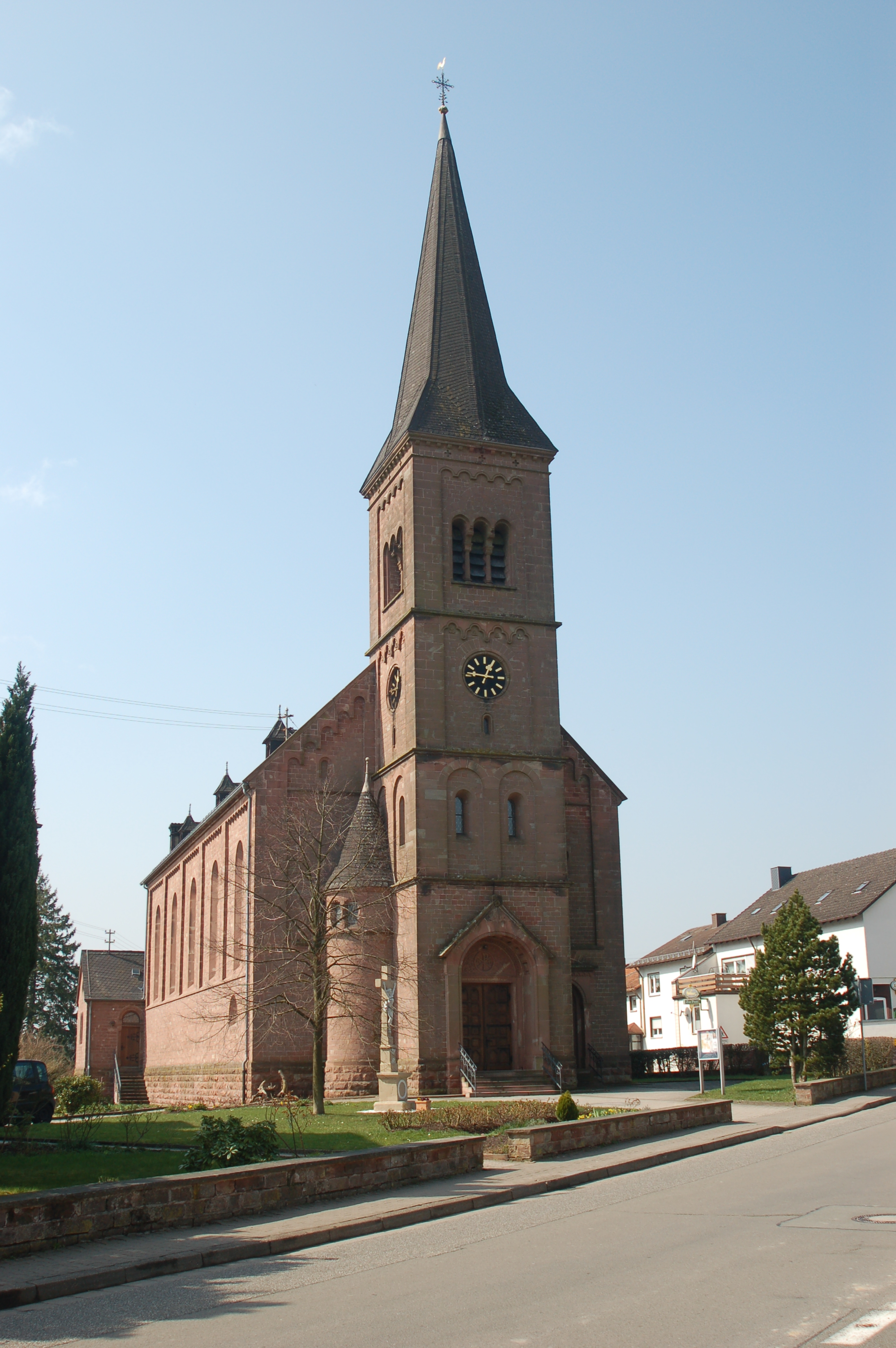 Selbst erstelltes Bild (Ortszentrum Hermersberg, kath. Kirche) Author: Volker Fremgen Datum: 01.04.2007